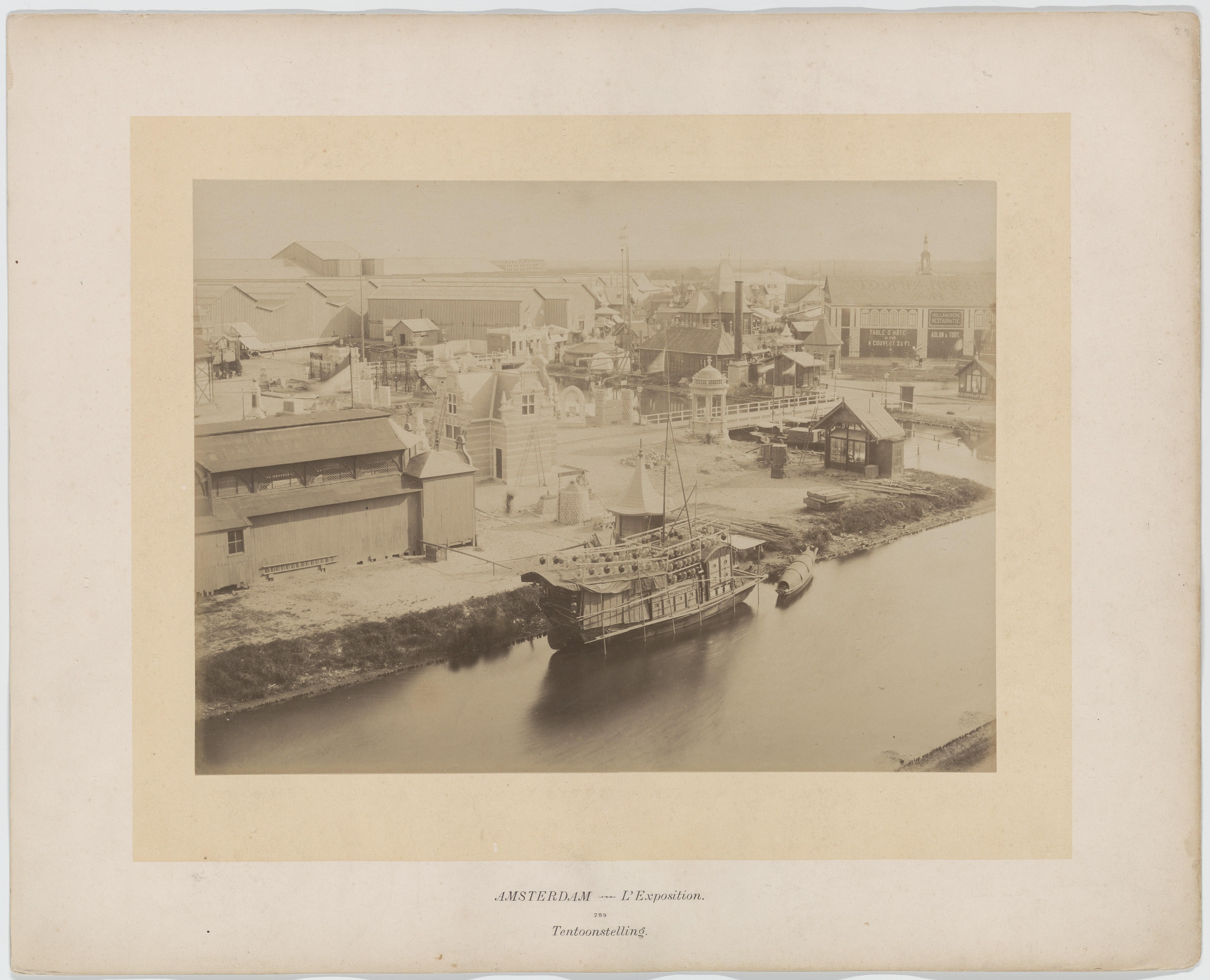 Beschrijving Amsterdam - L'Exposition.